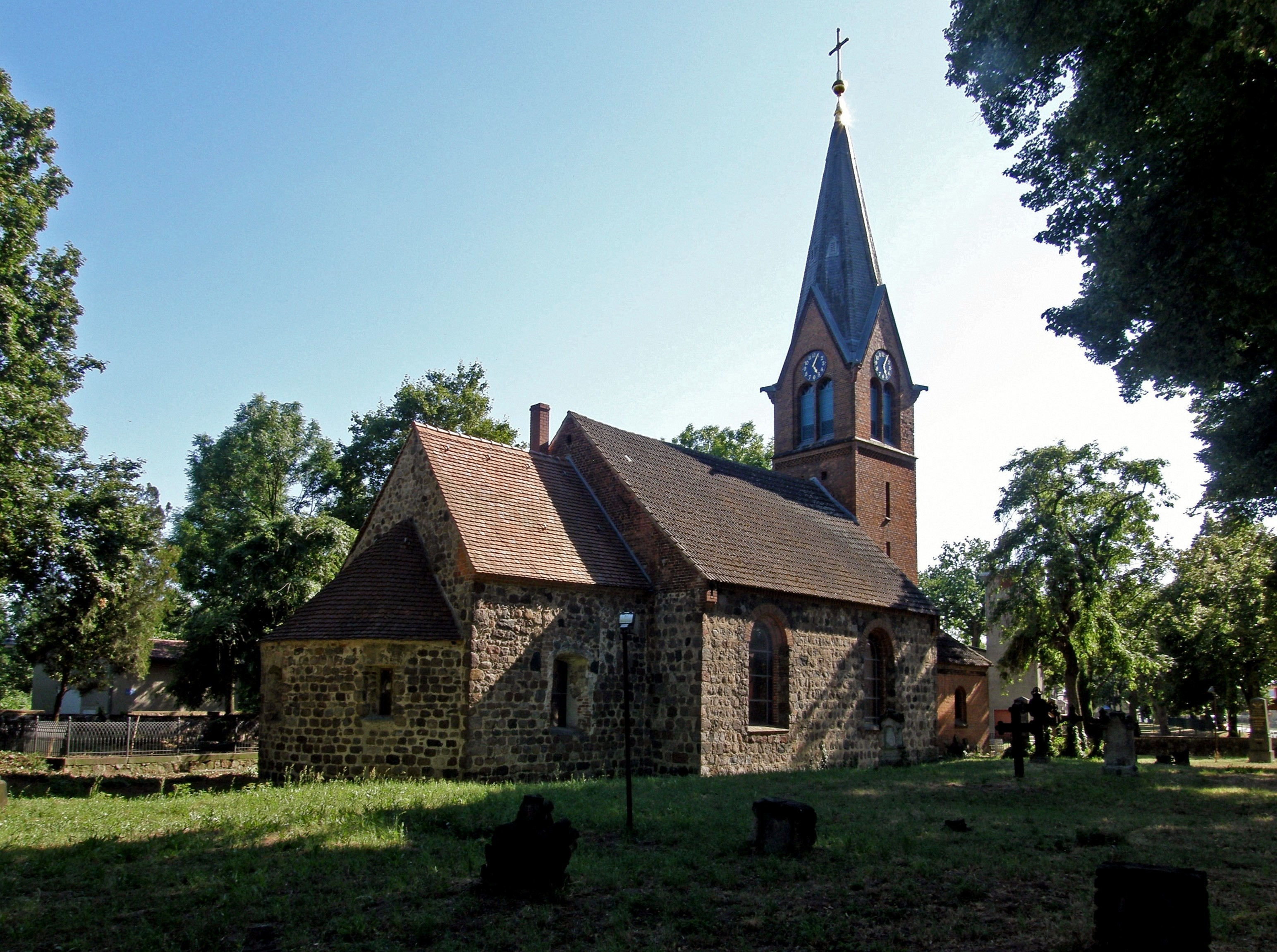 Dorfkirche in Großziethen (Ortsteil von Schönefeld, Landkreis Dahme-Spreewald, Land Brandenburg)